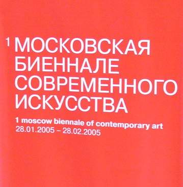 no original description